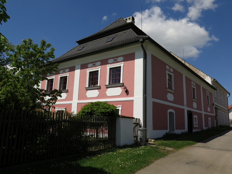 Fara, Hartvíkov 2, Hartvíkov.